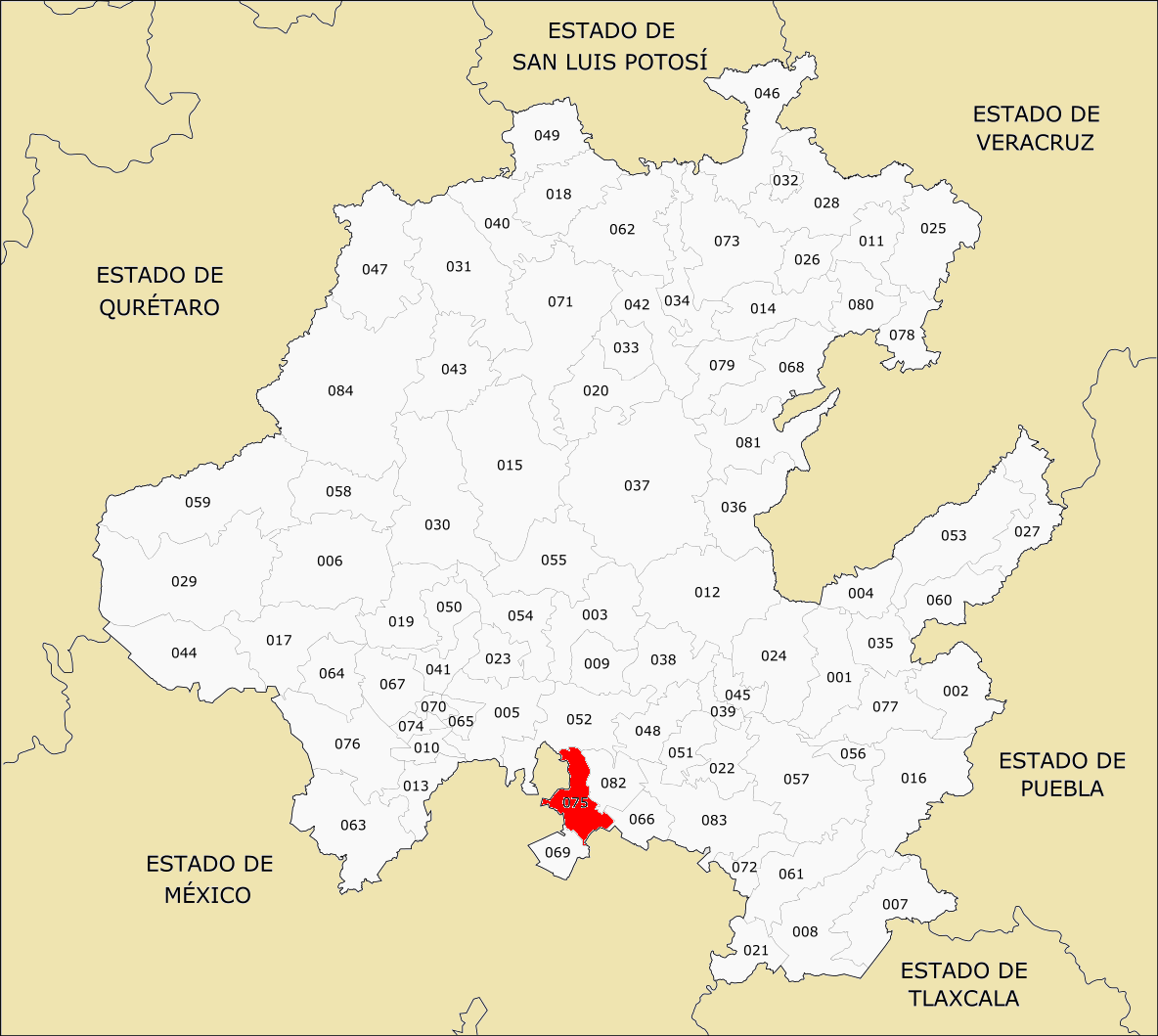 Municipios de Hidalgo